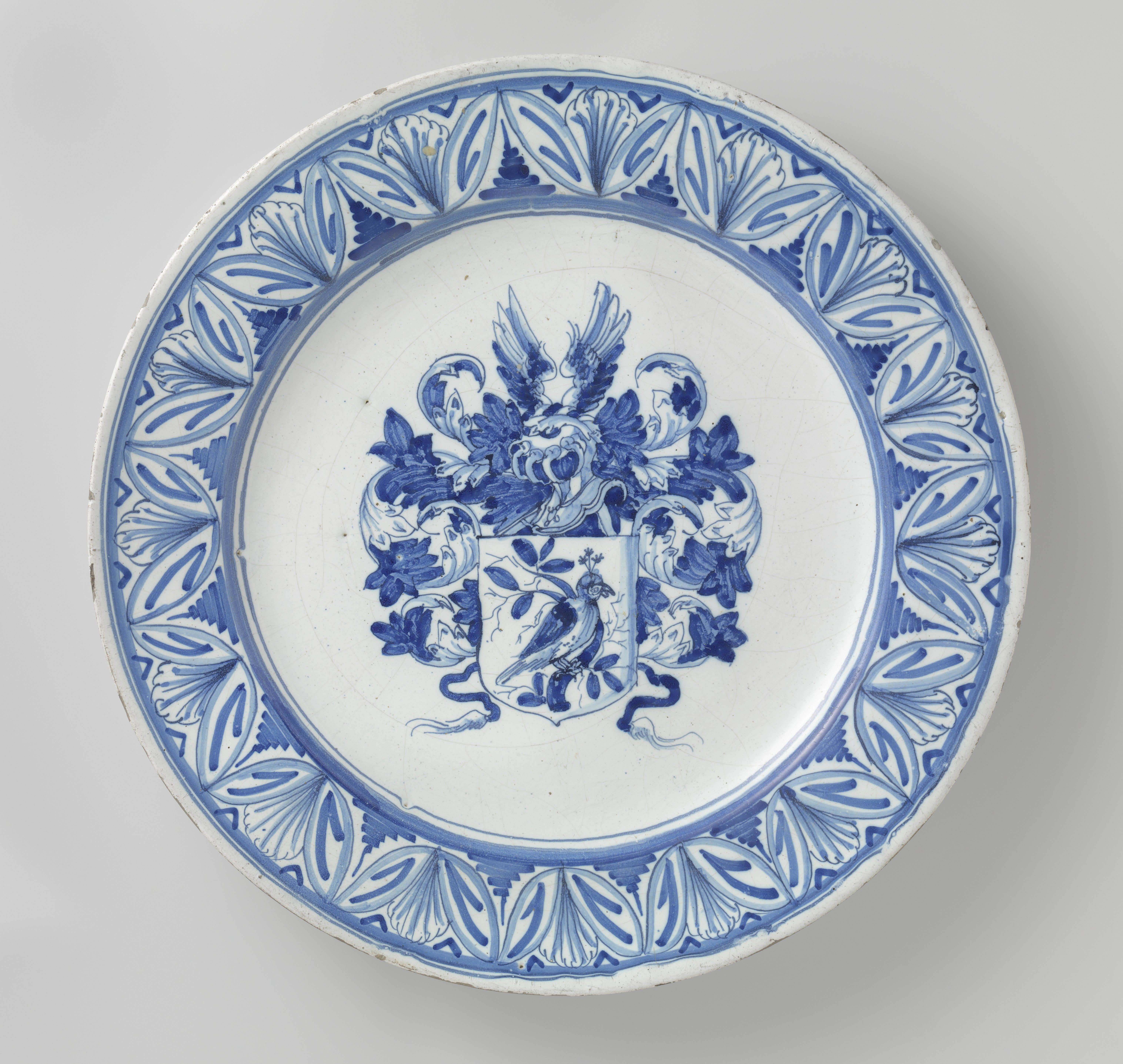 Wapenschotel met onbekende wapen